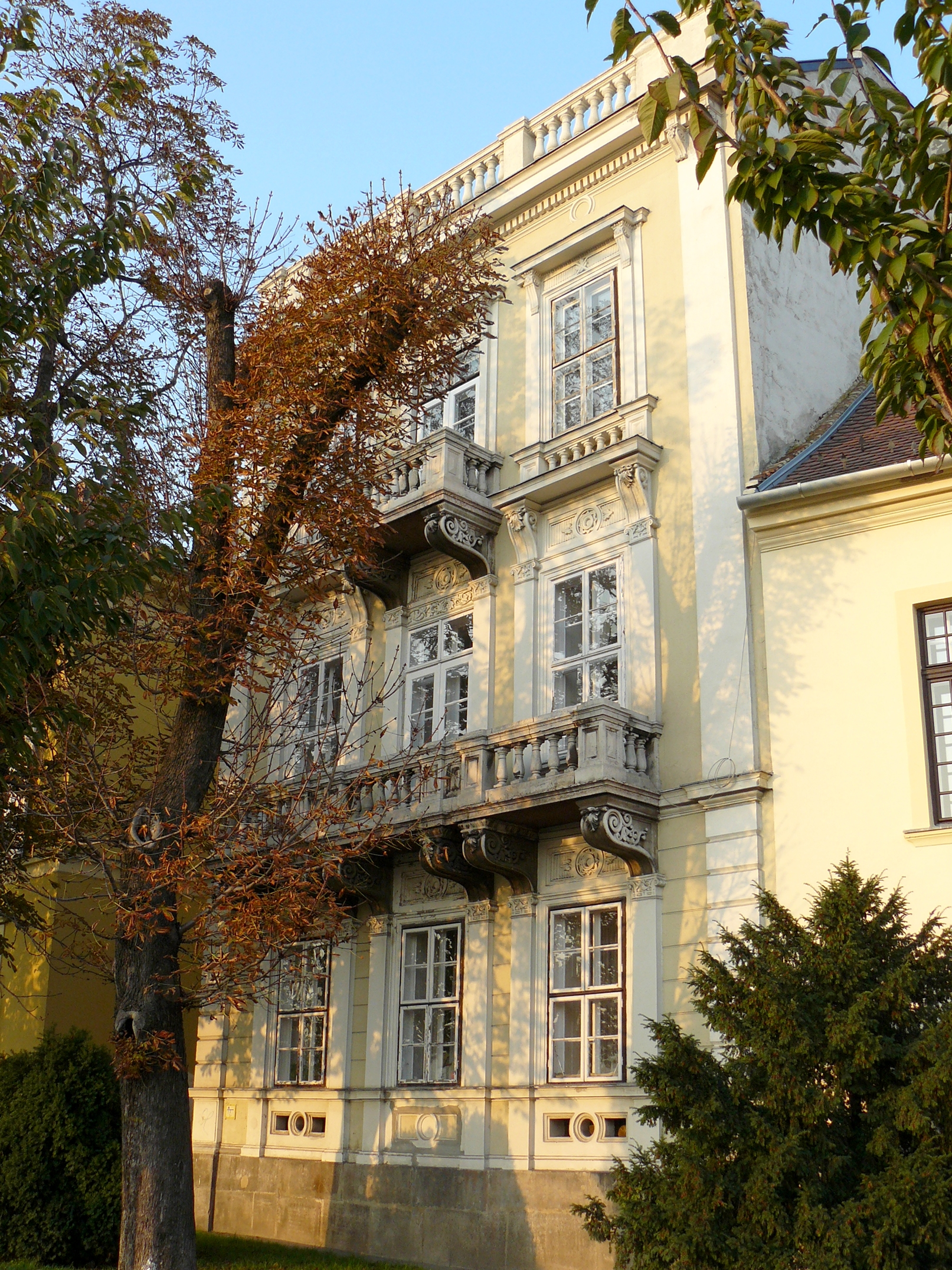 Ennek az épületnek az első emeletén kapott helyet 1870-ben az OMSZ elődje, az Országos Meteorológiai és Földmágnesességi Intézet. Az épület a Budai várban található, ez a homlokzat a Tóth Árpád sétányra néz. I. Tóth Árpád sétány, ~12 This is a photo of a monument in Hungary. Identifier: 177